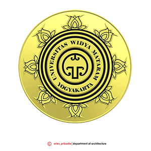 Logo UWMY universitas widya mataram yogyakarta oleh aries pribadie